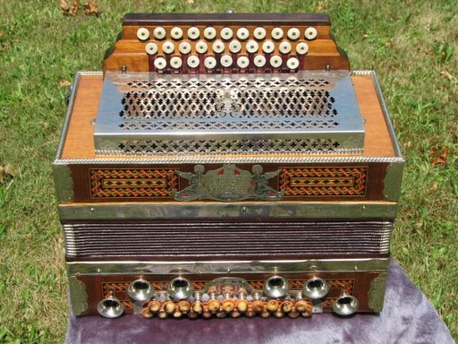 Stachl ditonic Box bulit 1931